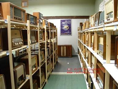 En del av utställningen av Rolf Bergendorffs stora radiosamling